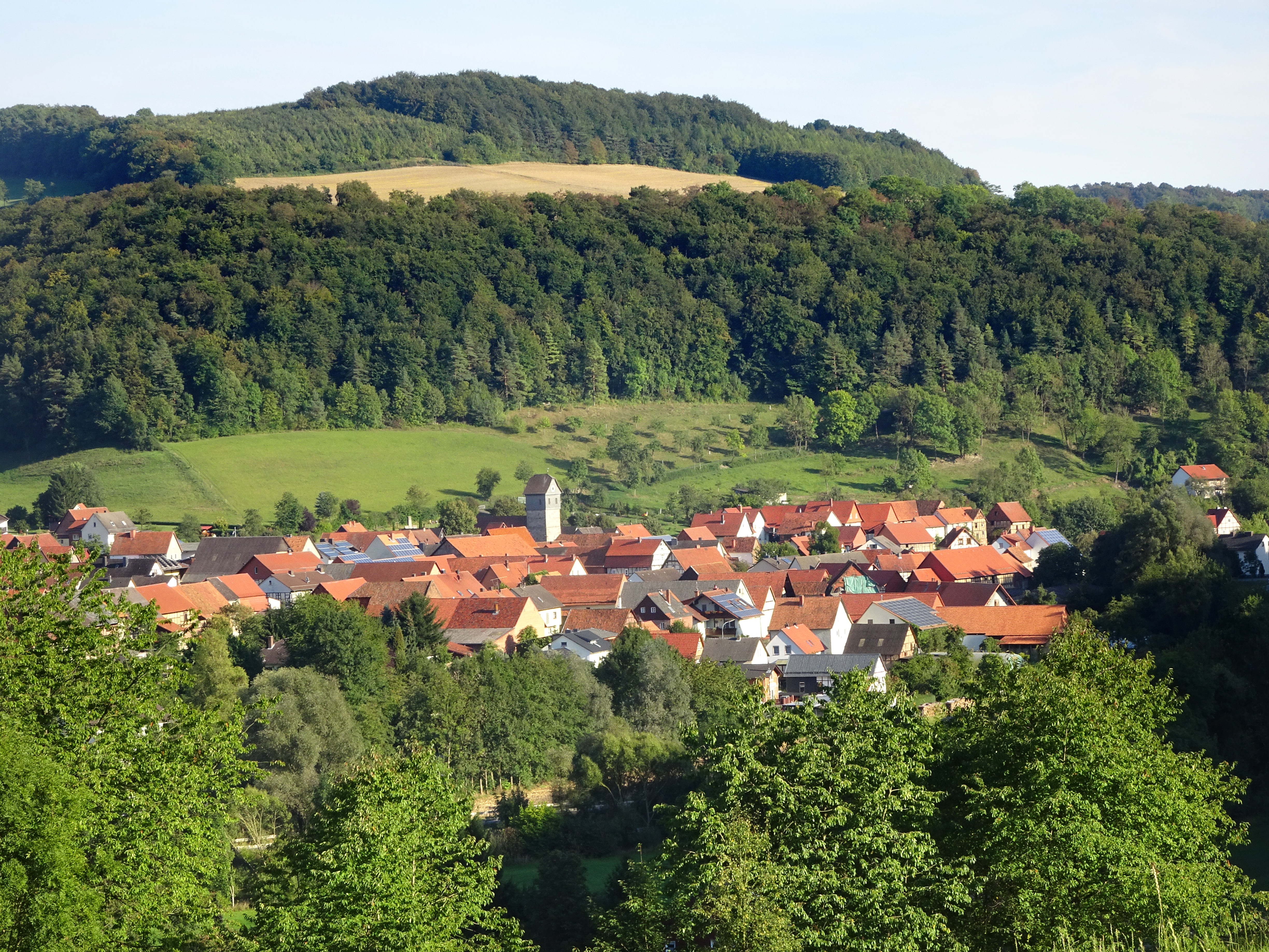 Blick auf Breitau aus nordwestlicher Richtung. Breitau ist ein Stadtteil von Sontra im nordhessischen Werra-Meißner-Kreis. Die ursprüngliche Bebauung in der Umgebung der Kirche wird vom Denkmalschutz als Gesamtanlage als schützenswert erachtet. "Die evangelische Pfarrkirche erhebt sich weit sichtbar an exponierter Stelle der nordöstlichen Ortsperipherie. Der Westturm aus massiven Mauerwerk wurde im 13. Jahrhundert errichtet, das ursprünglich dazugehörige Langhaus wurde durch ein Feuer im Jahr 1668 vernichtet. Das heutige Schiff in Backsteinmauerwerk stammt aus dem Jahr 1893." Text aus: Denkmaltopographie Bundesrepublik Deutschland, Kulturdenkmäler in Hessen. Werra-Meißner-Kreis I, Altkreis Eschwege. Peer Zietz, Thomas Wiegand, Braunschweig: Vieweg Verlag, 1991, ISBN 3-528-06240-1.